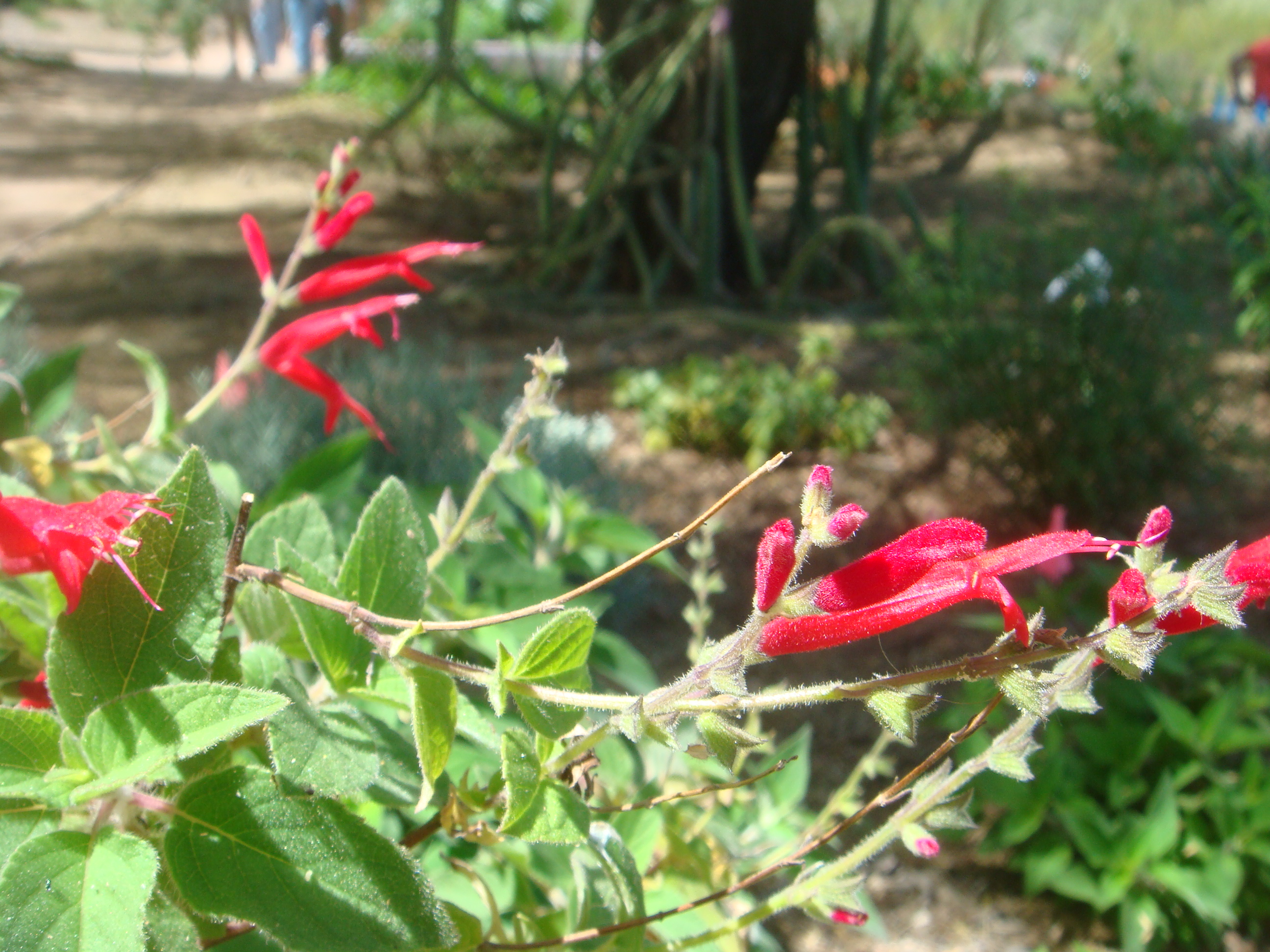 Salvia elegans, cultivated, Desert Botanical Garden, Phoenix, Arizona